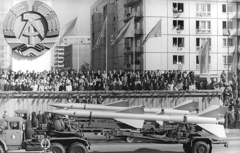 ADN-ZB / Kluge / 7.10.1979 / Berlin: Ehrenparade Eine Ehrenparade der NVA zum 30. Jahrestag der DDR war am 7.10.79 in Berlin beeindruckender Auftakt des Jubiläumstages. Unser Foto zeigt eine Formation Fla-Raketen der Luftverteidigung vor der Ehrentribüne.